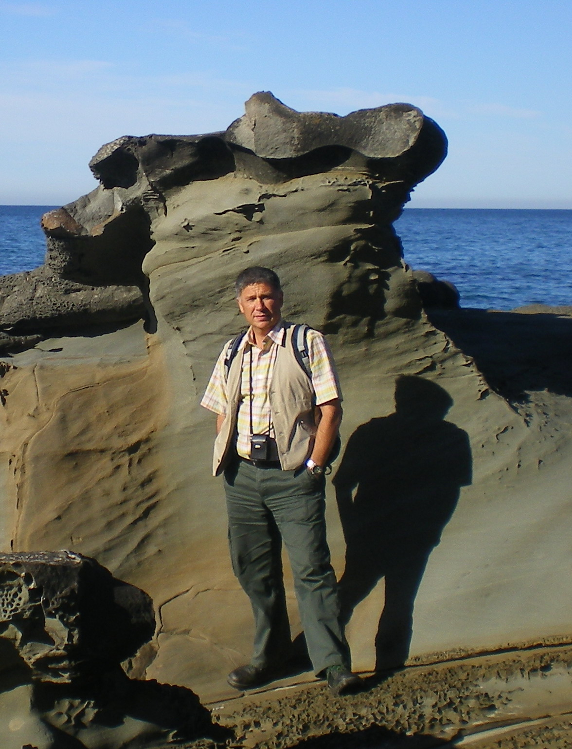 Географ Н. Николаев на юго-восточном берегу Австралии